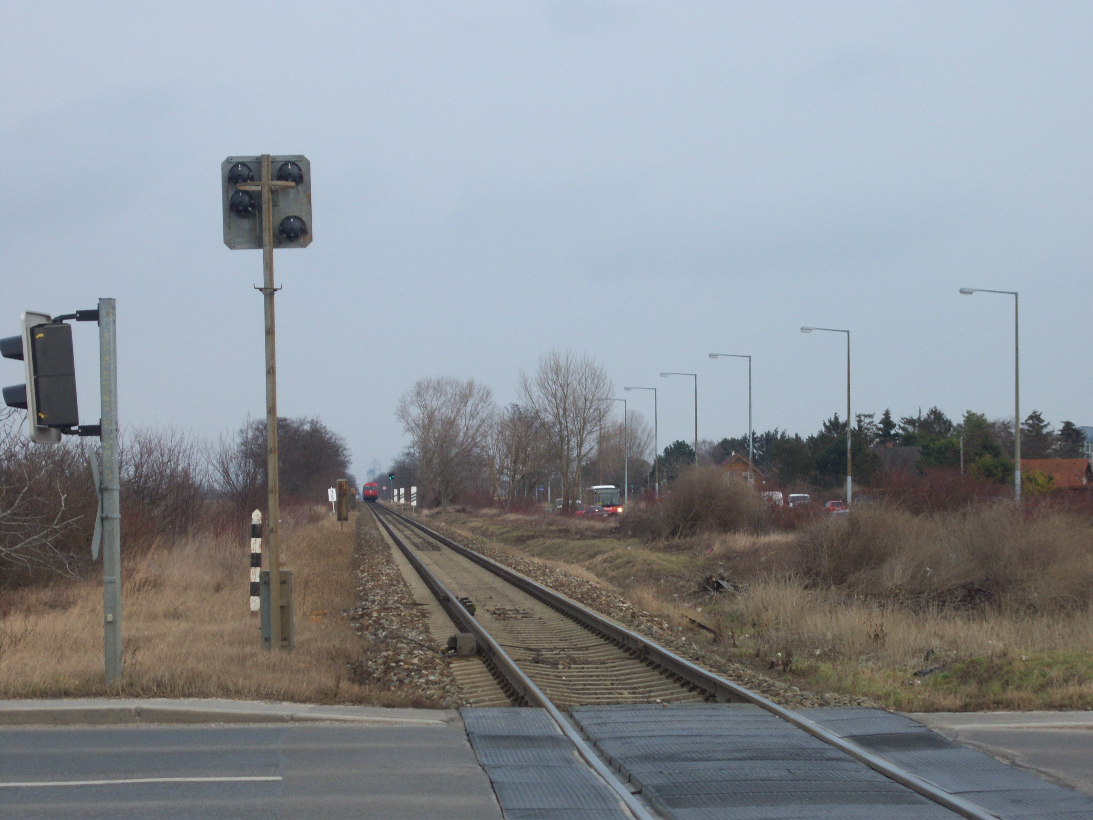 Regionalzug nächst Bahnhof Wien Hausfeldstraße